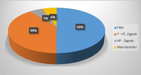 Vlasnička struktura HT ERONET